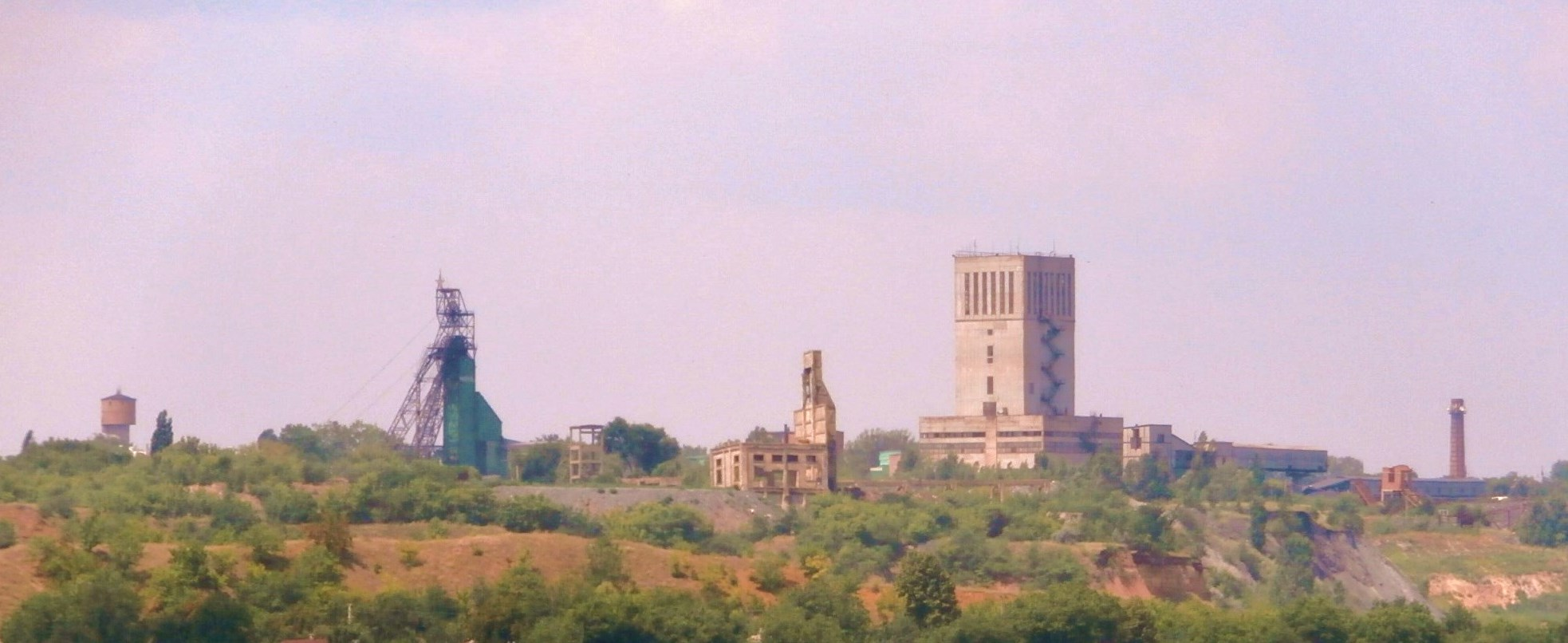 Schowti Wody Skyline der Erzminen von Osten gesehen. Im Vordergrund das Tal der Schowta